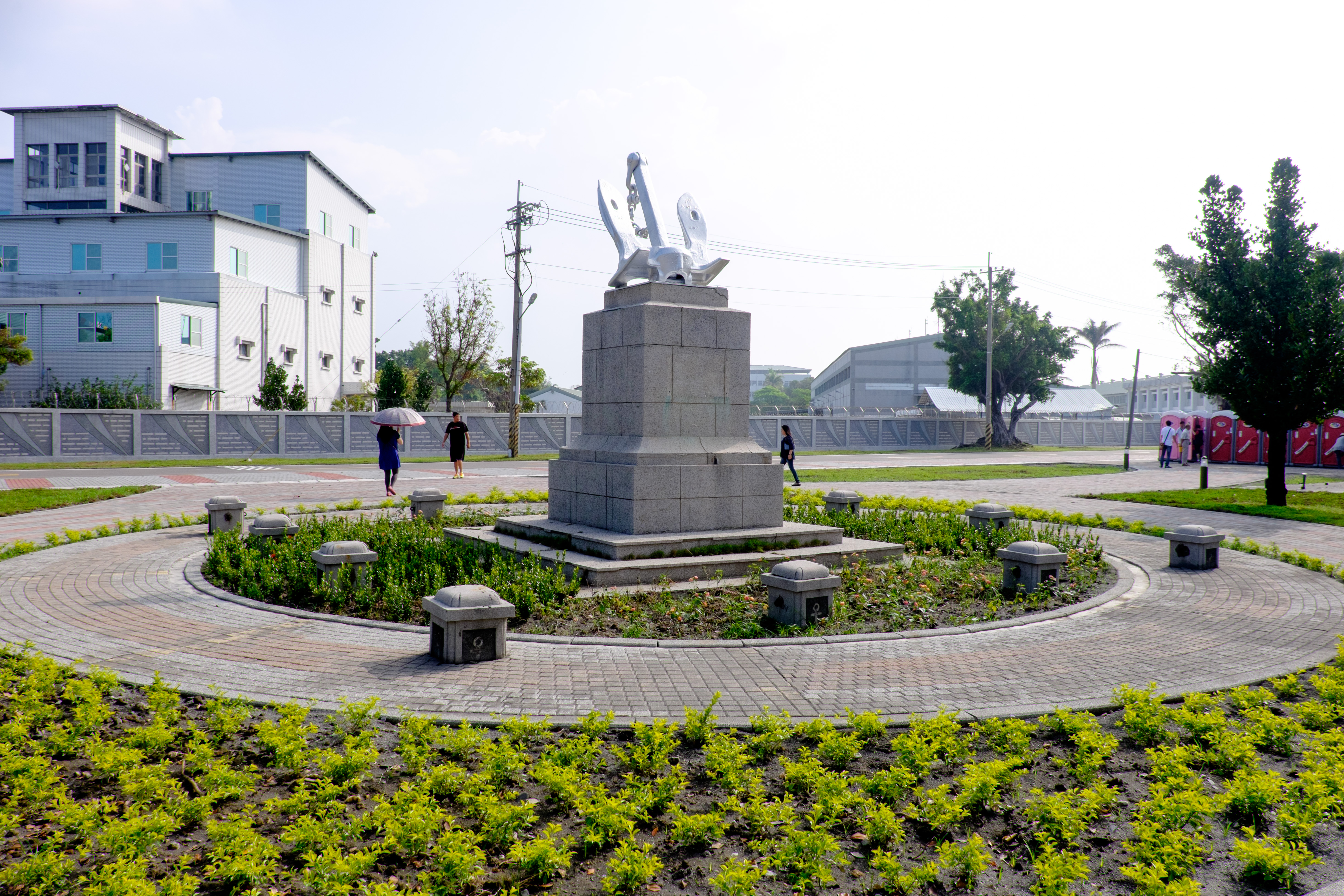 左營軍港東三號碼頭附近的紀念錨，攝於2015年左營軍港營區開放活動。和去年相比，錨基附近已加整建美化。